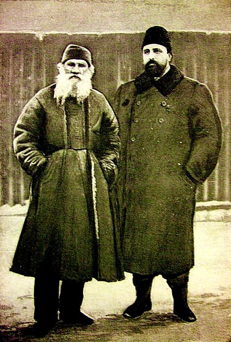 Лев Николаевич Толстой (1828-1910) и Владимир Григорьевич Чертков (1854-1936)